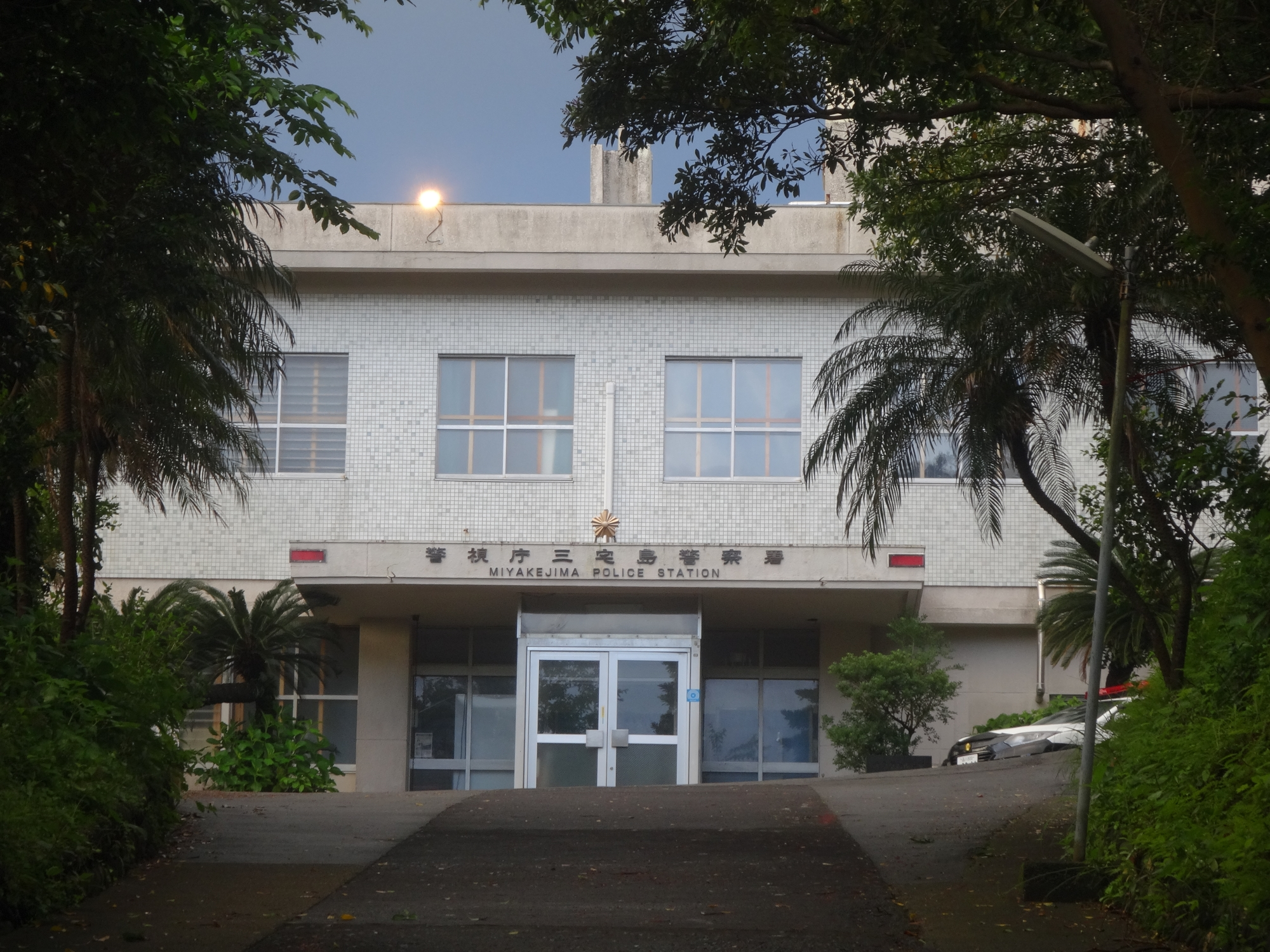 警視庁三宅島警察署